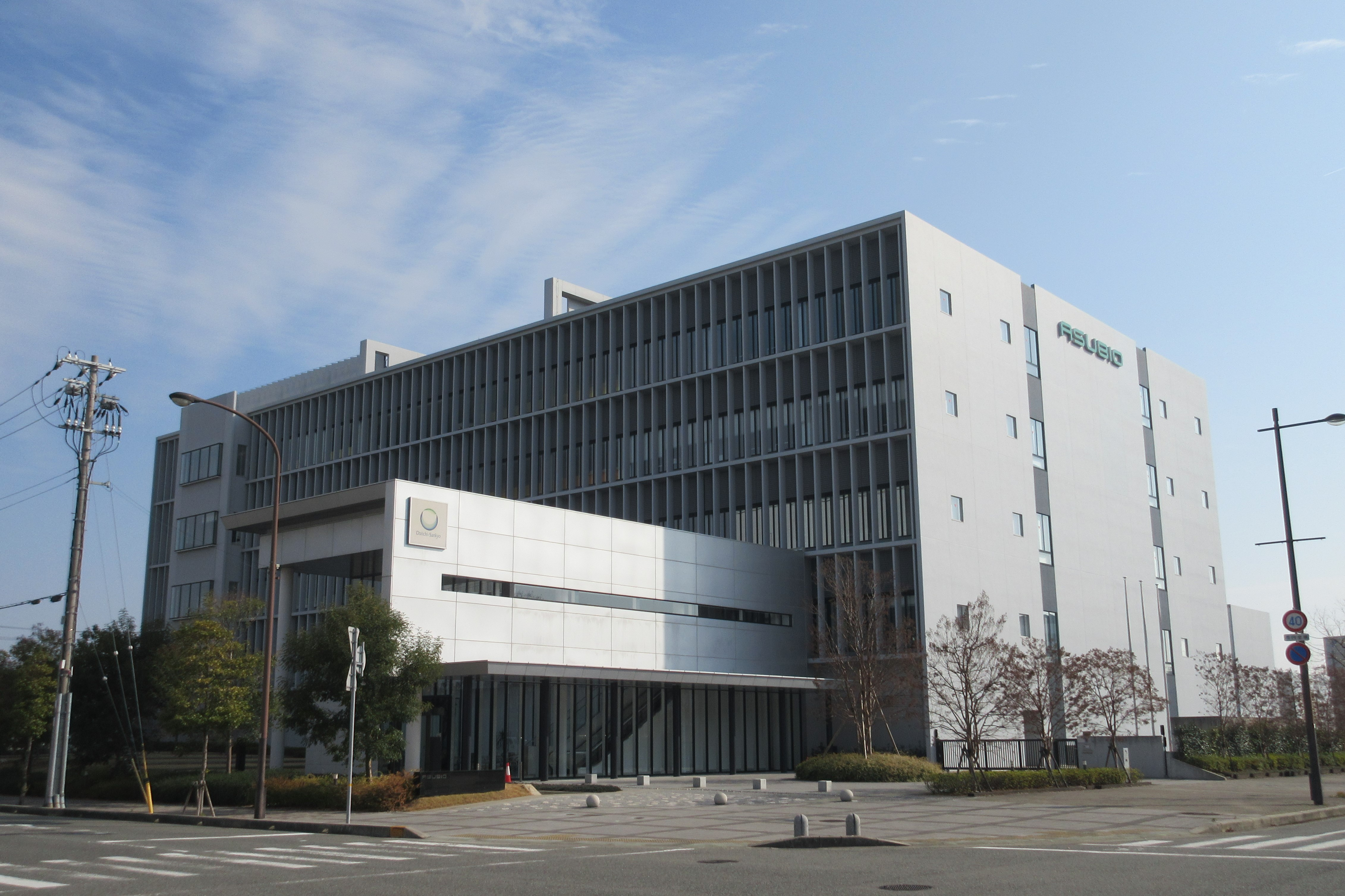 アスビオファーマ本社